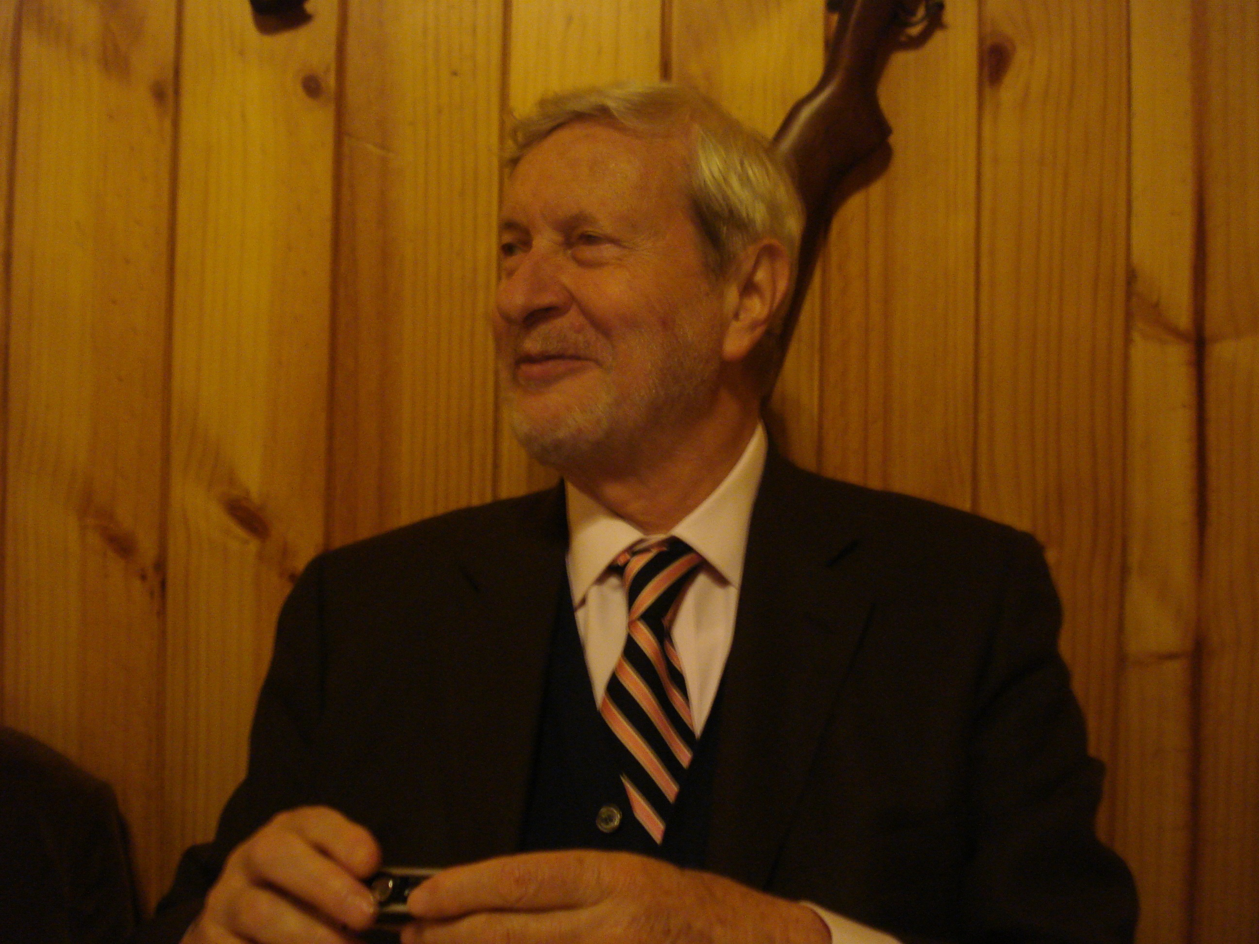 Visita de Gianni Vattimo a Perú en 2010 en ocasión de la Feria Internacional del Libro de Lima. Foto tomada en un restaurante de San Isidro